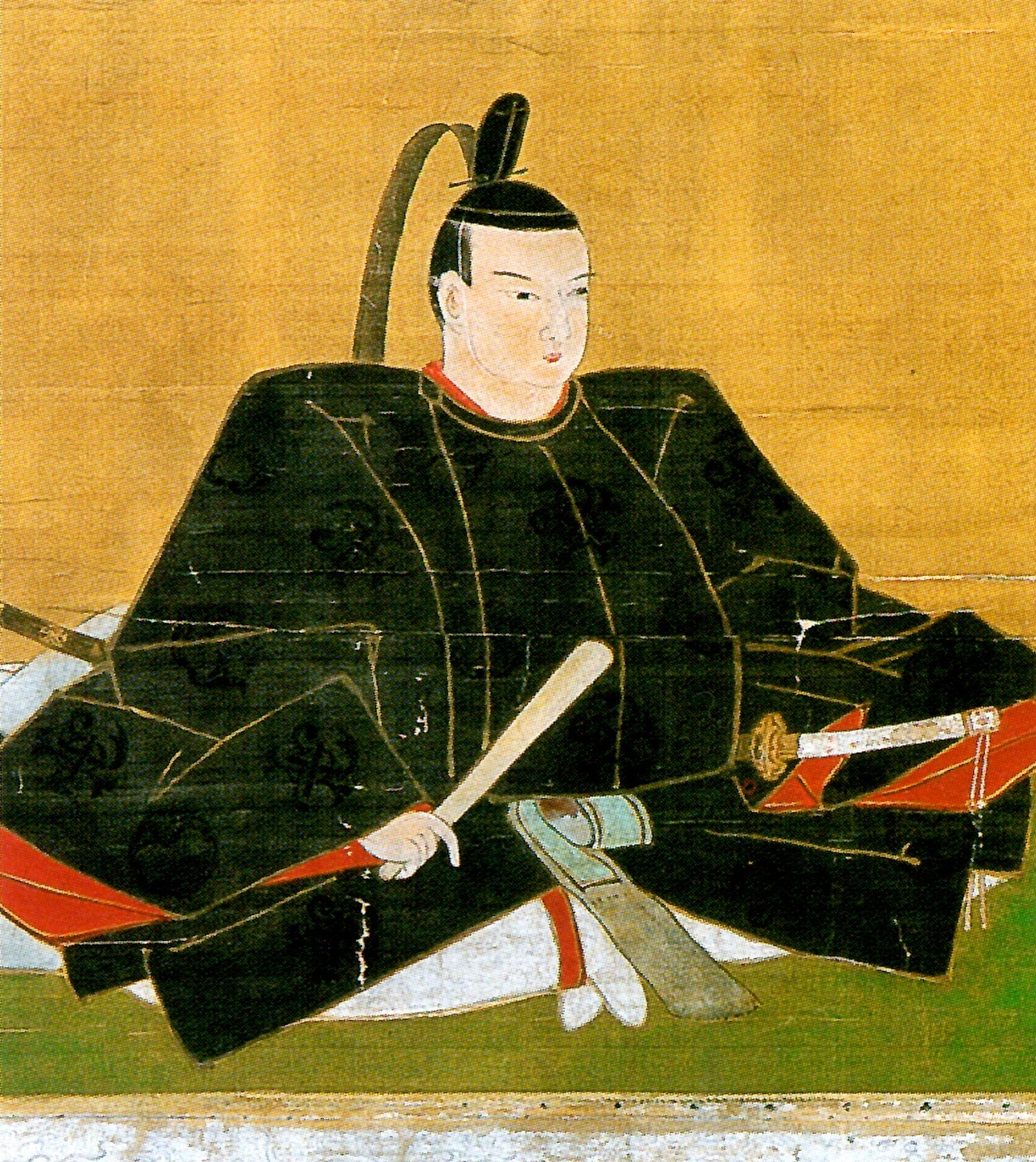 立花貞則の肖像。